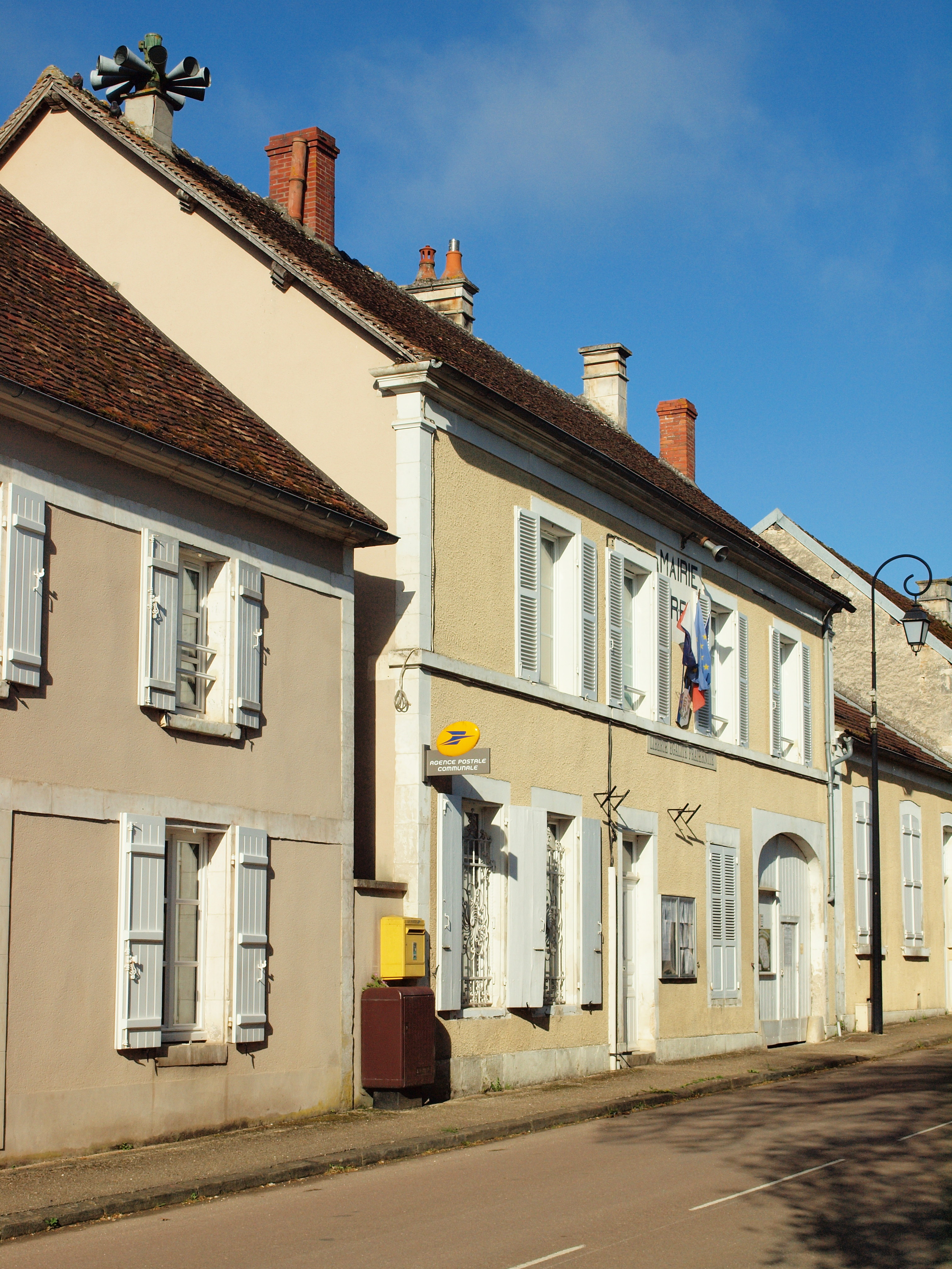 Sougères-en-Puisaye (Yonne, France) ; mairie